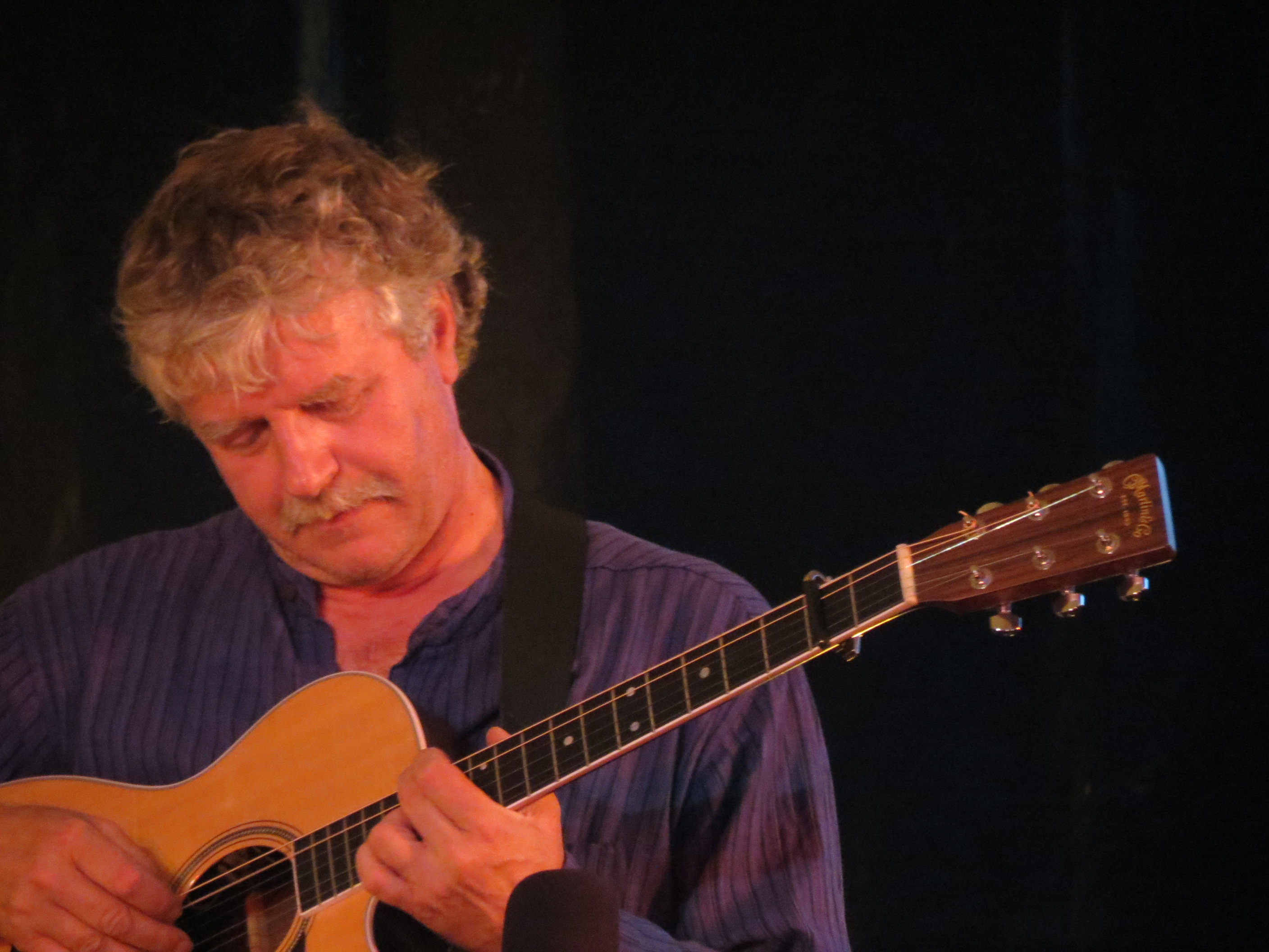 Gilles Le Bigot à Guérande avec Barzaz dans le cadre des Festi'Cités